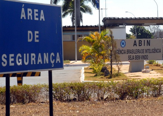 Prédio da Agência Brasileira de Inteligência (Abin)